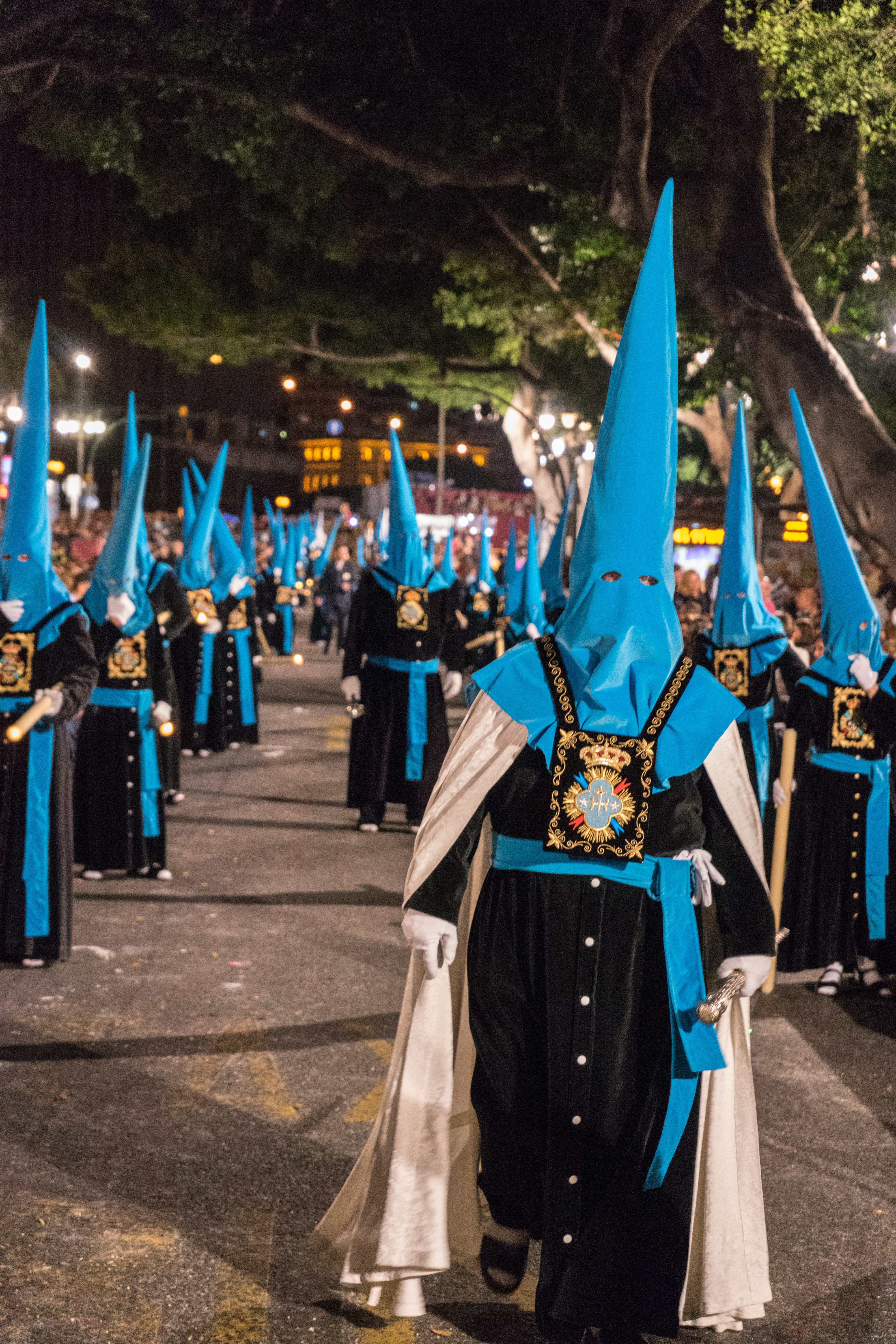 Real, Ilustre y Venerable Hermandad del Santo Traslado y Nuestra Señora de la Soledad This is a photography of a Folklore festival in Spain (Wikidata id Q9075883).